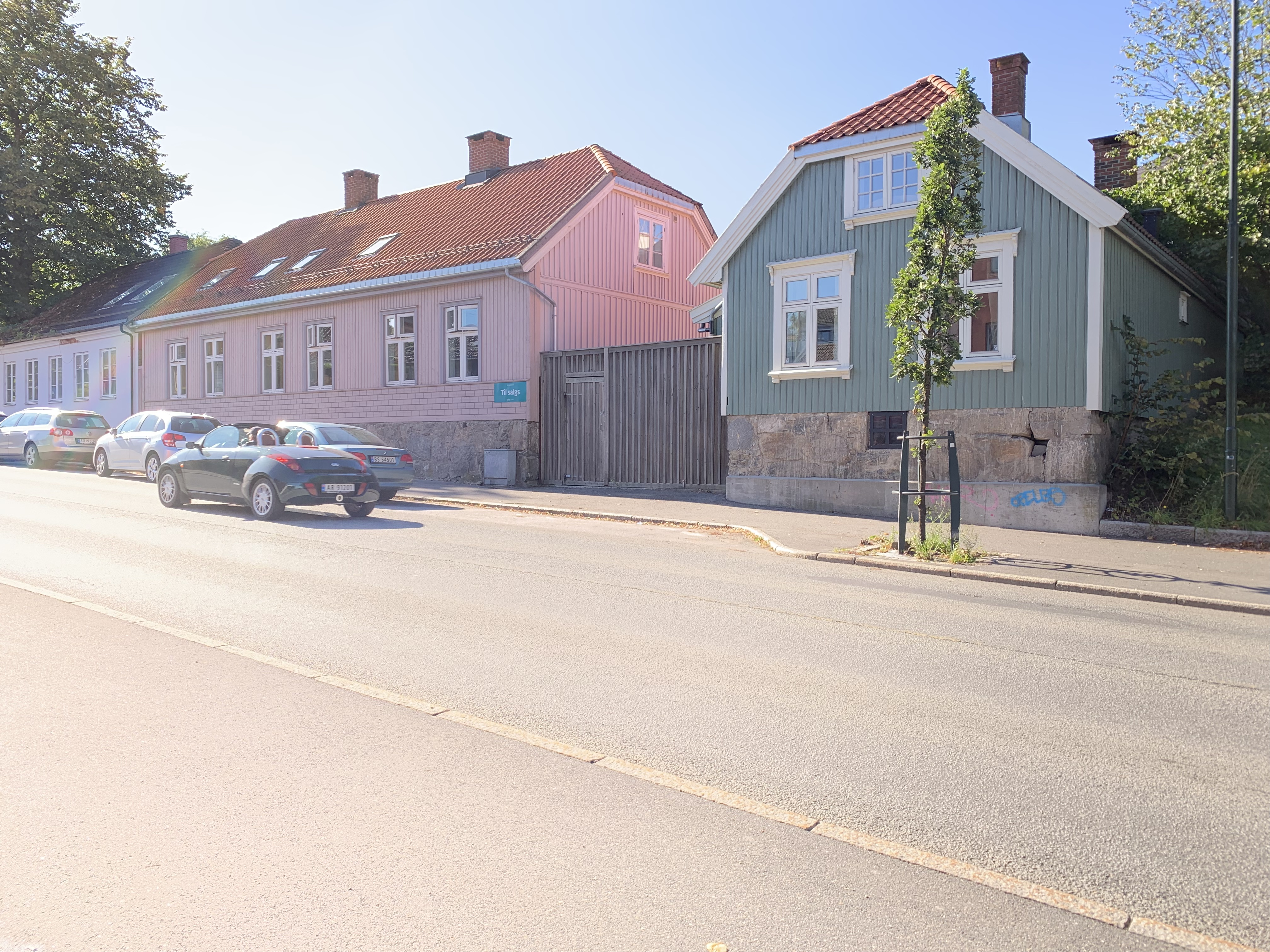 Dette er et bilde av begge husene på Klostergata 5.